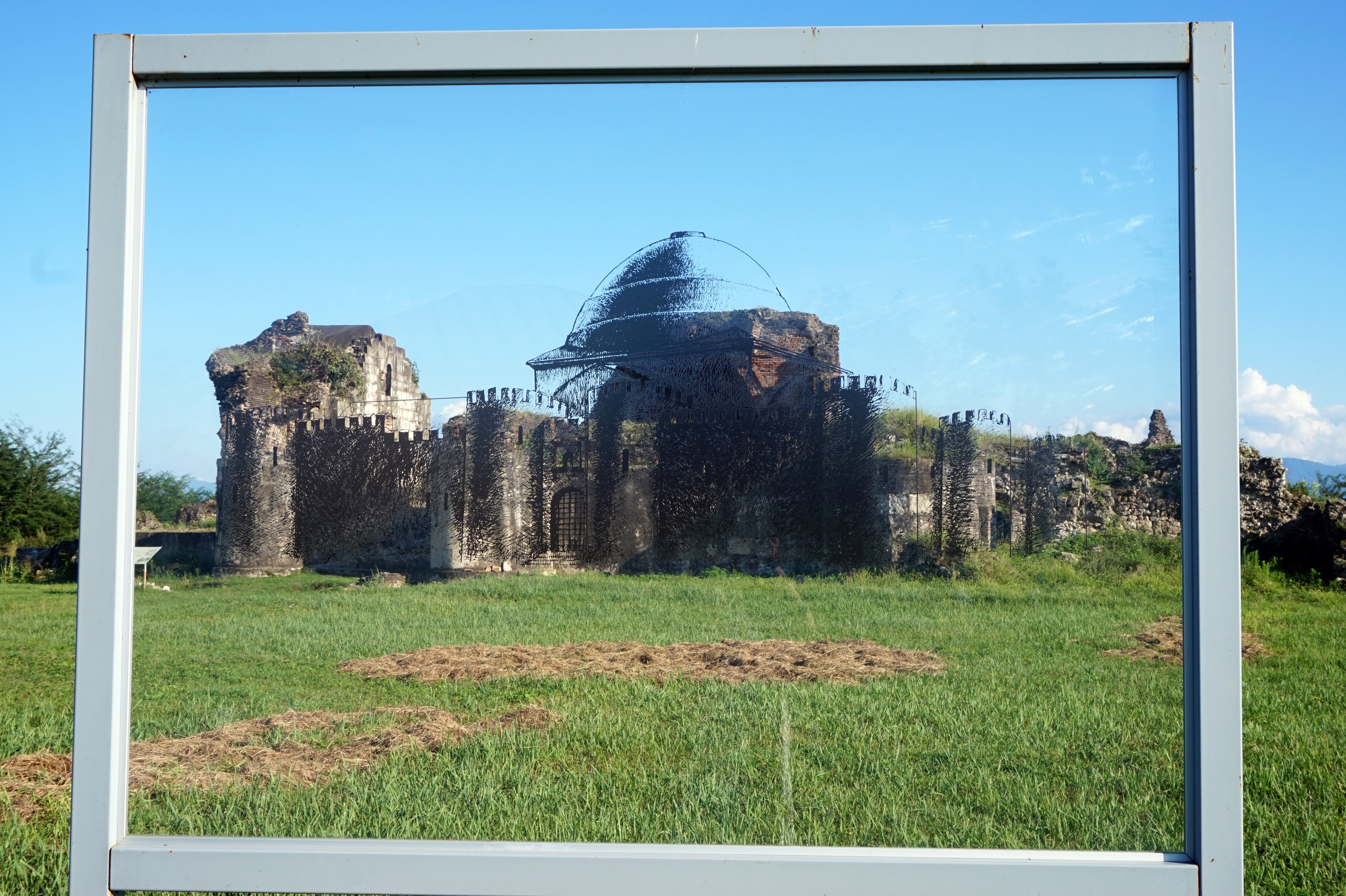 格古特宫。